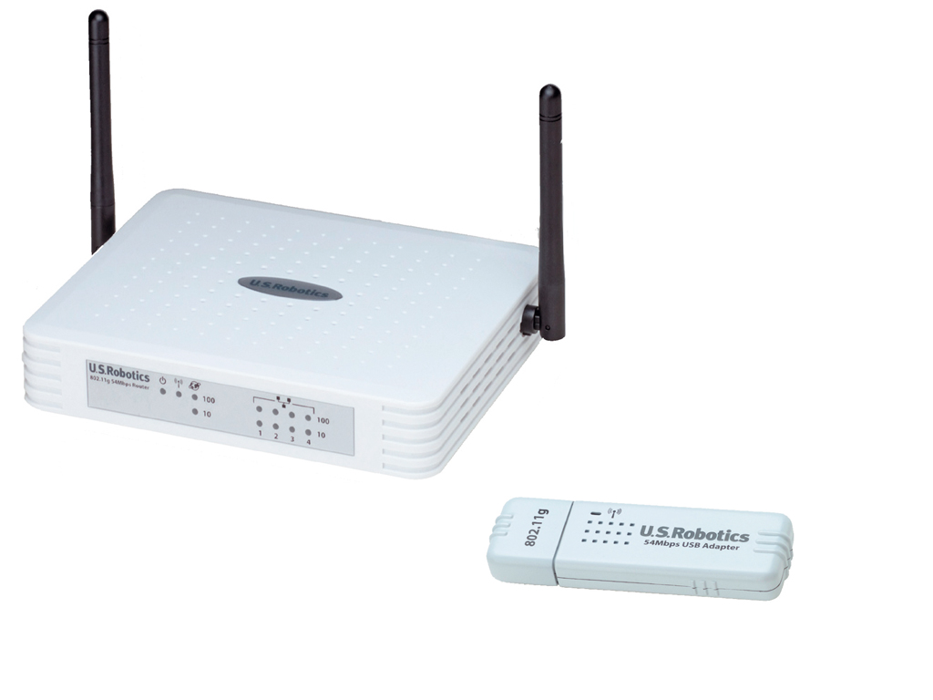 Routeur Wi-Fi (Netgear WGR614v4).